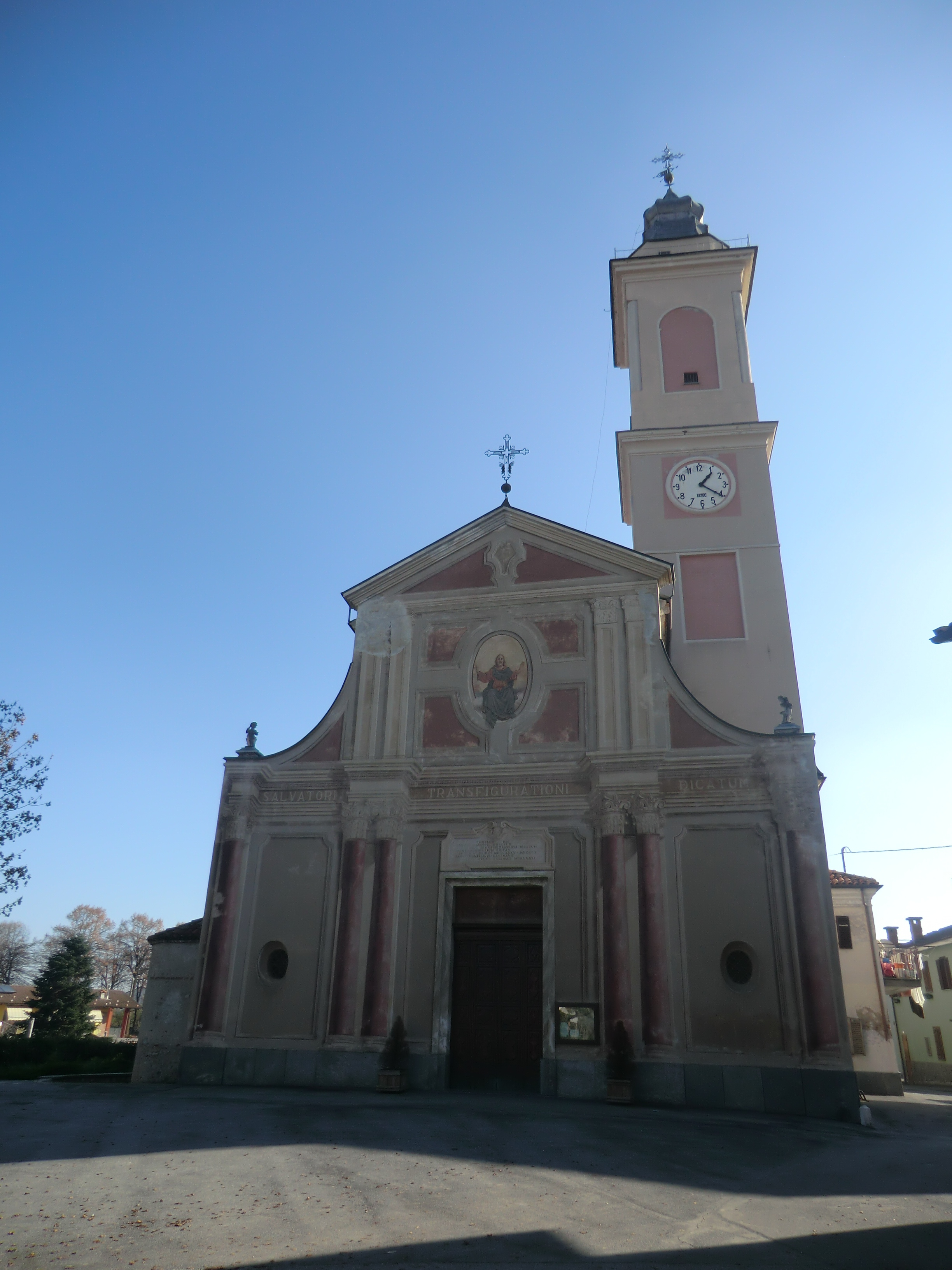 Montanera (Cuneo): chiesa della Trasfigurazione di Nostro Signore (XV - XVIII sec.)